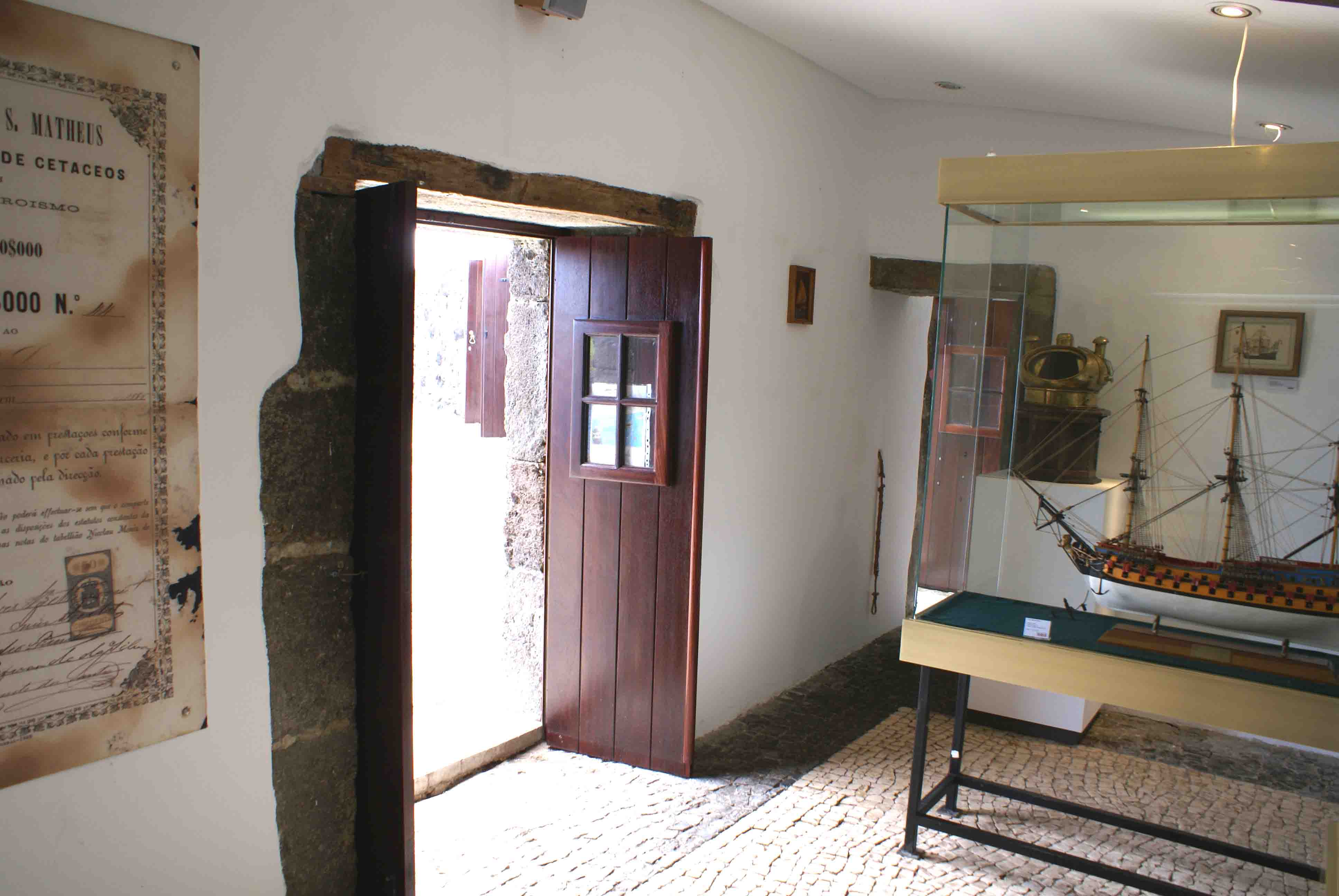 Museu do Forte do Negrito, ilha Terceira, Açores, Portugal